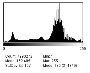 Gato2 histo